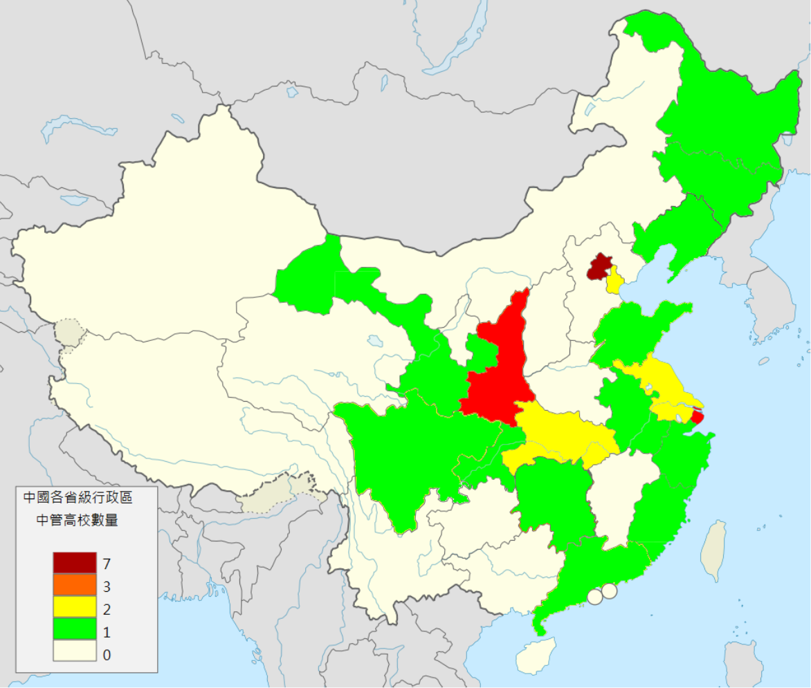 中國各省副部級大學數量